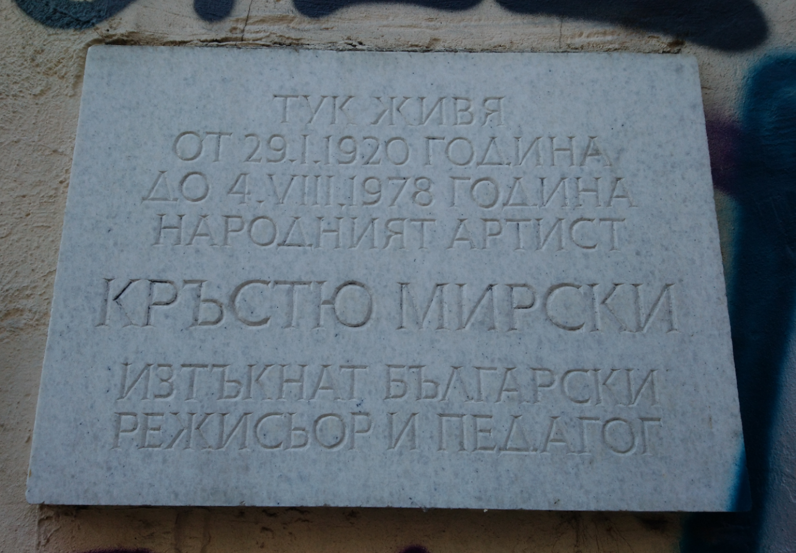 Паметна плоча на режисьора Кръстю Мирски, ул. Ангел Кънчев 32, София